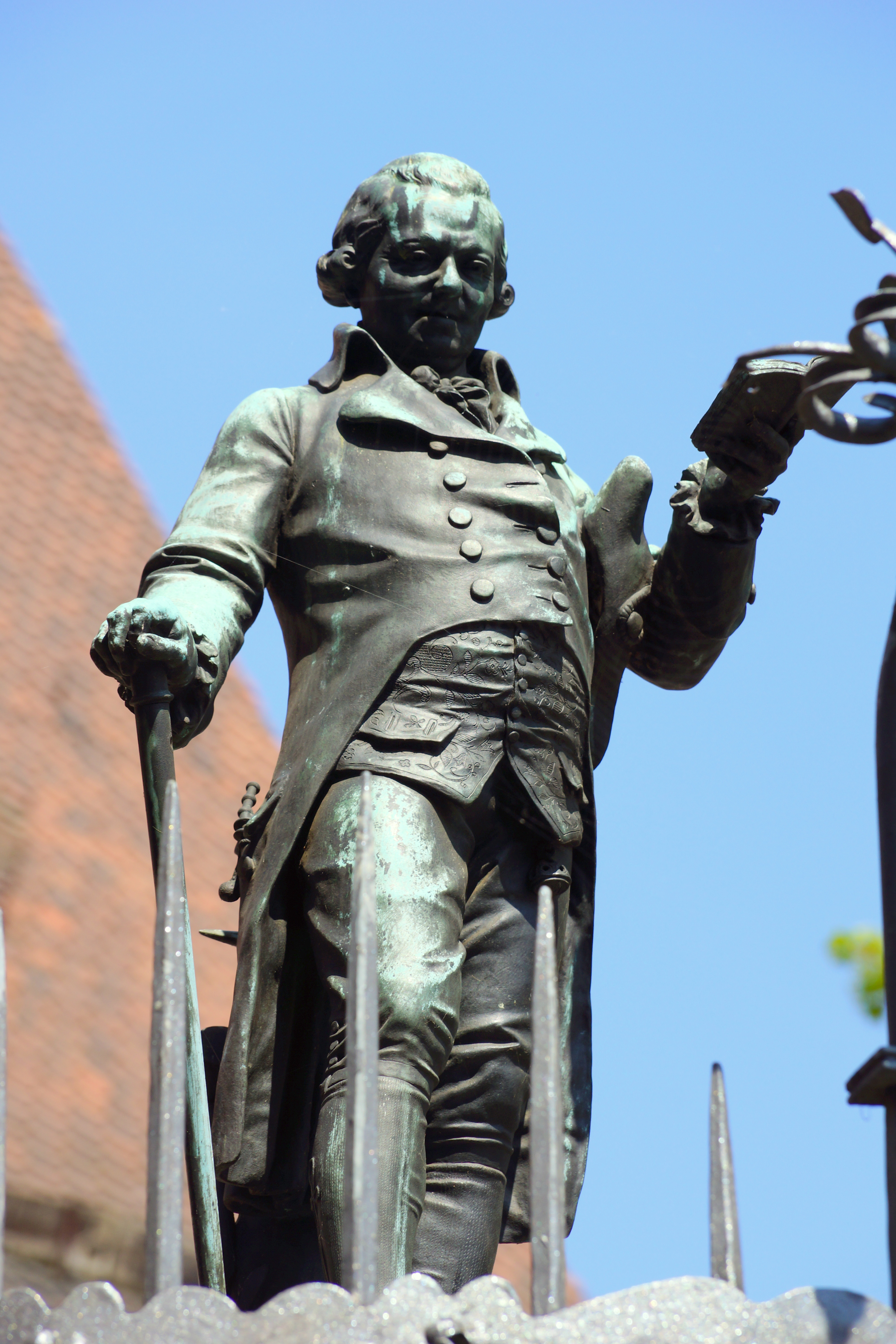 Der Grübel-Brunnen vor dem Laufer Torturm in Nürnberg